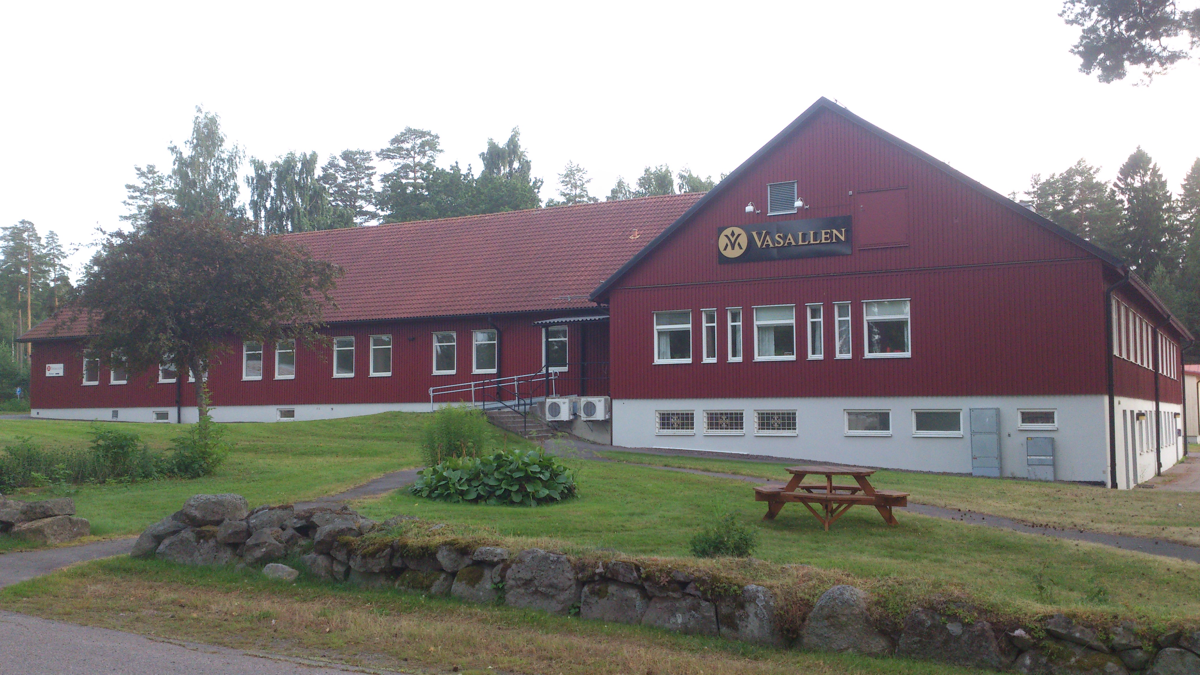 Brigadhuset. Mellan åren 1994 och 2000 var staberna för Bergslagens artilleriregemente (A 9) och Värmlandsbrigaden (IB 2) lokaliserade till byggnaden.